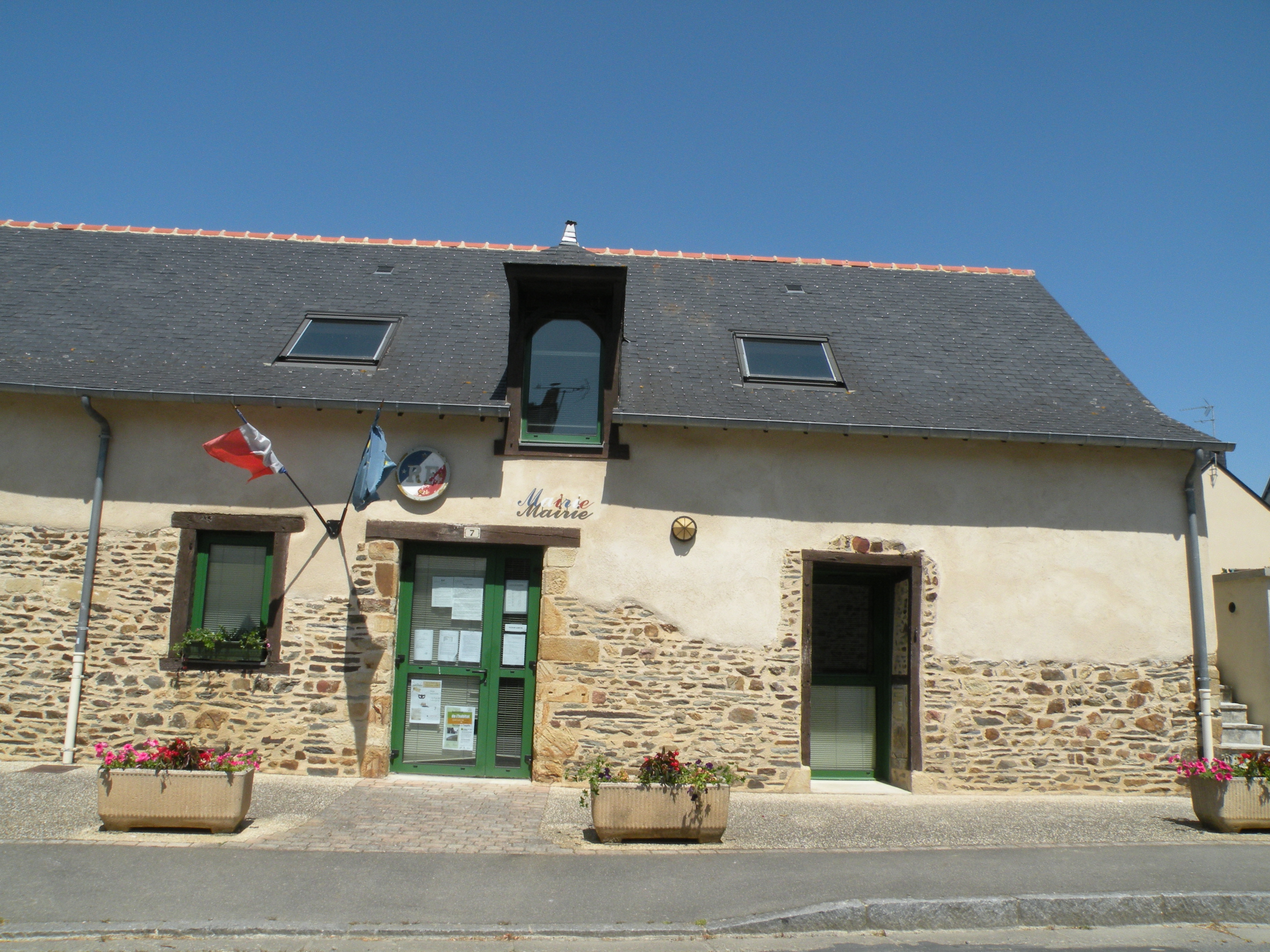 Mairie d’Ossé (Ille-et-Vilaine).